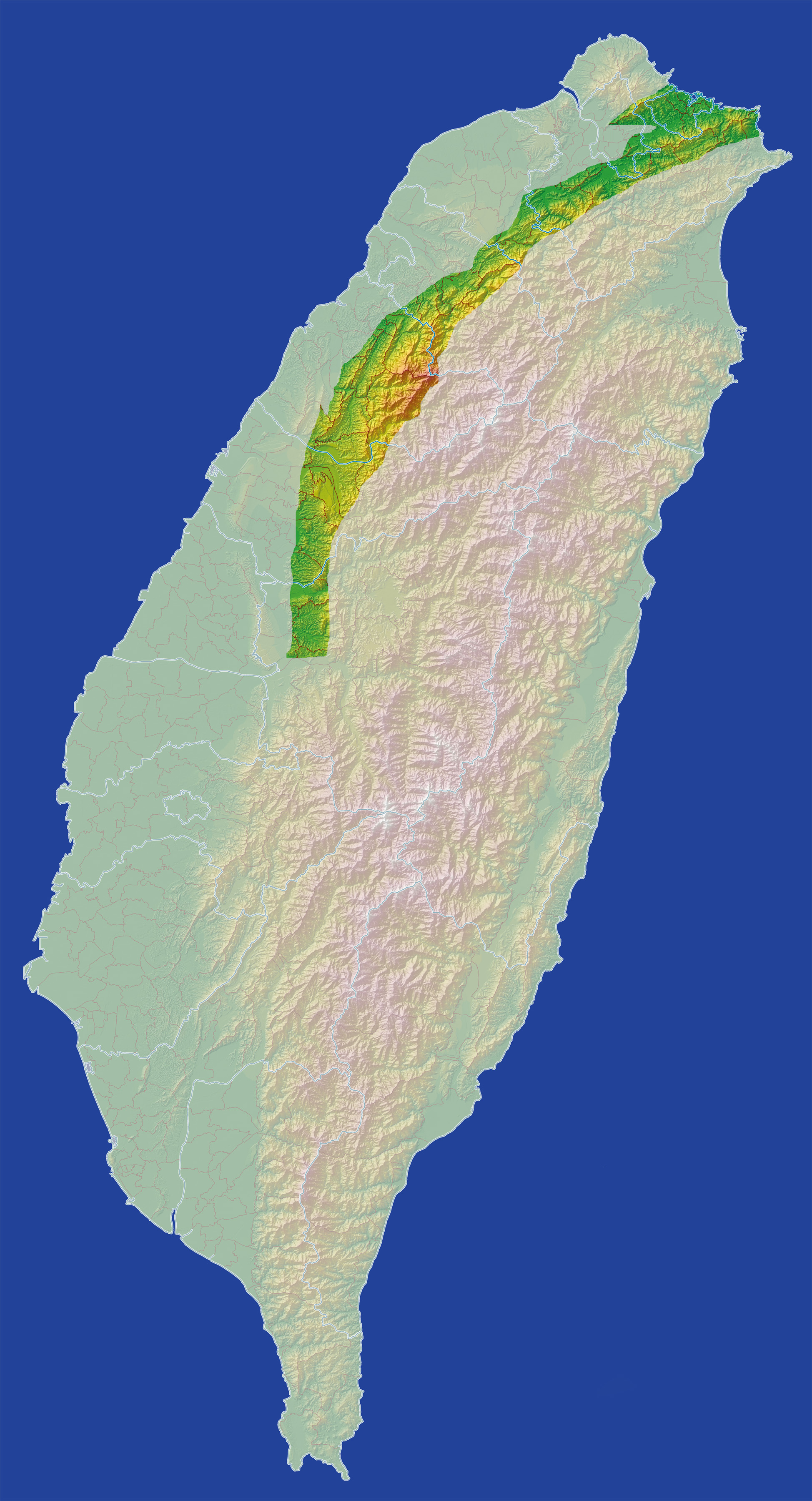 Map of Jialishan Range, Taiwan